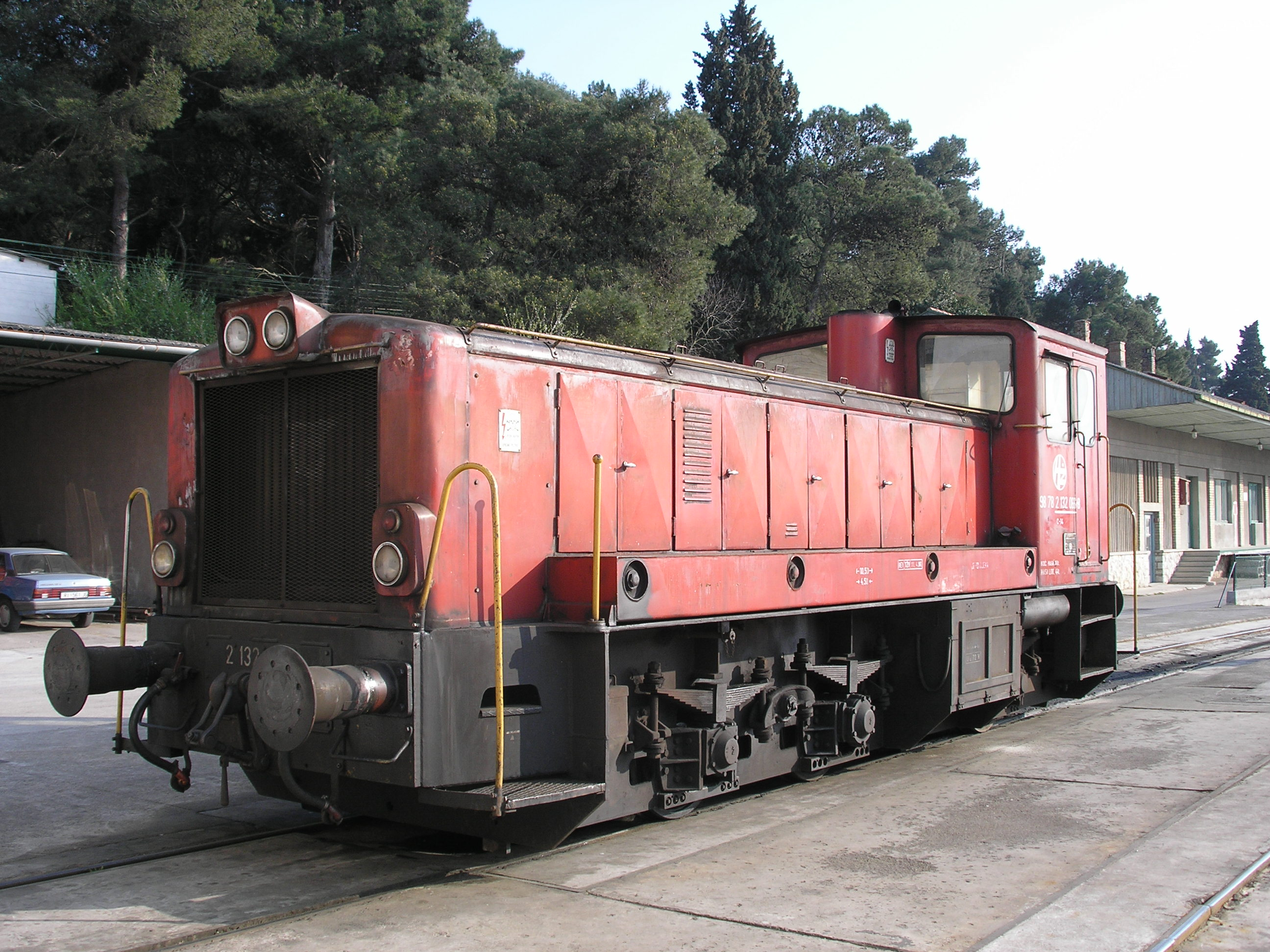 2132-066_locomotive in Pula, Croatia self-made